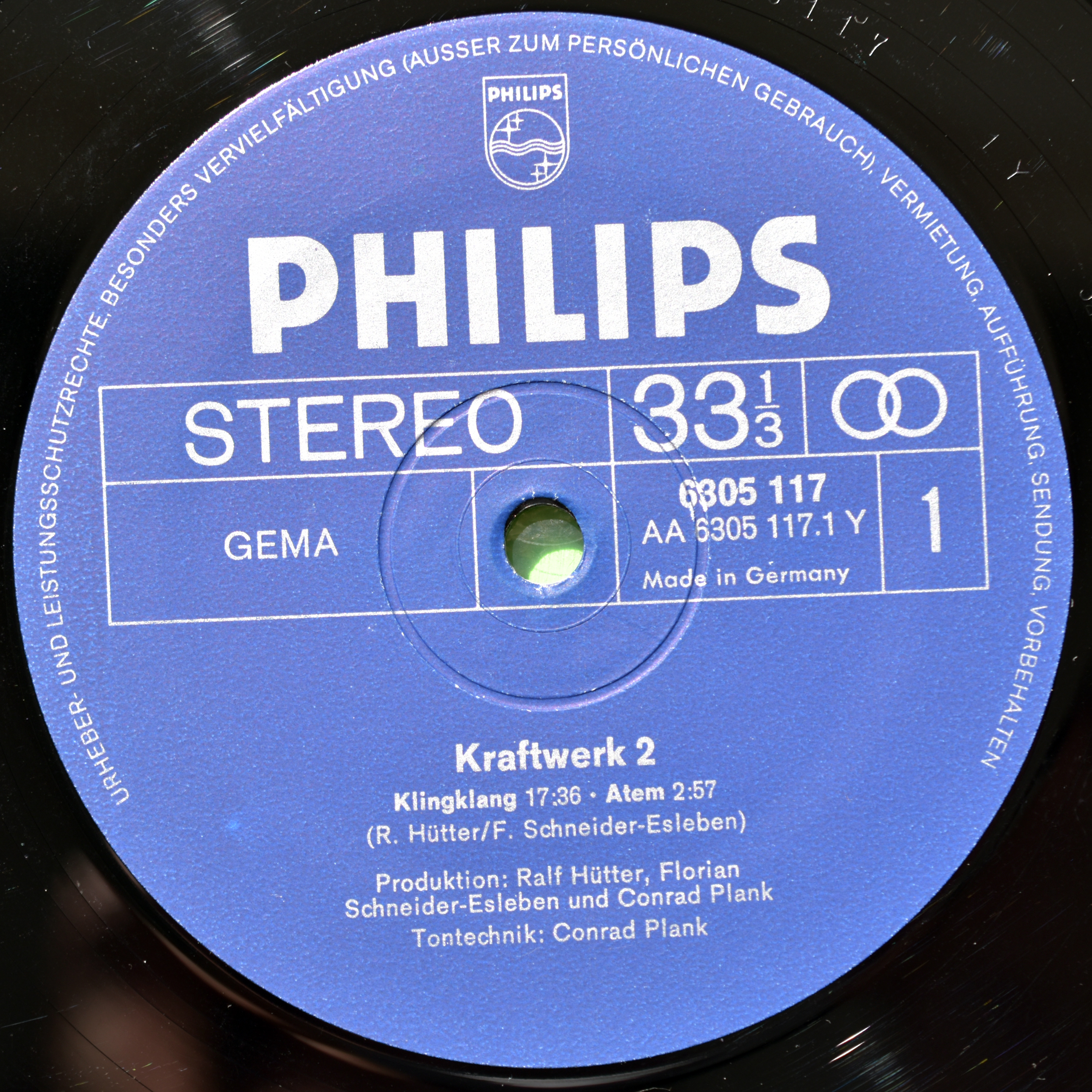 Kraftwerk 2, Plattenlabel, Philips